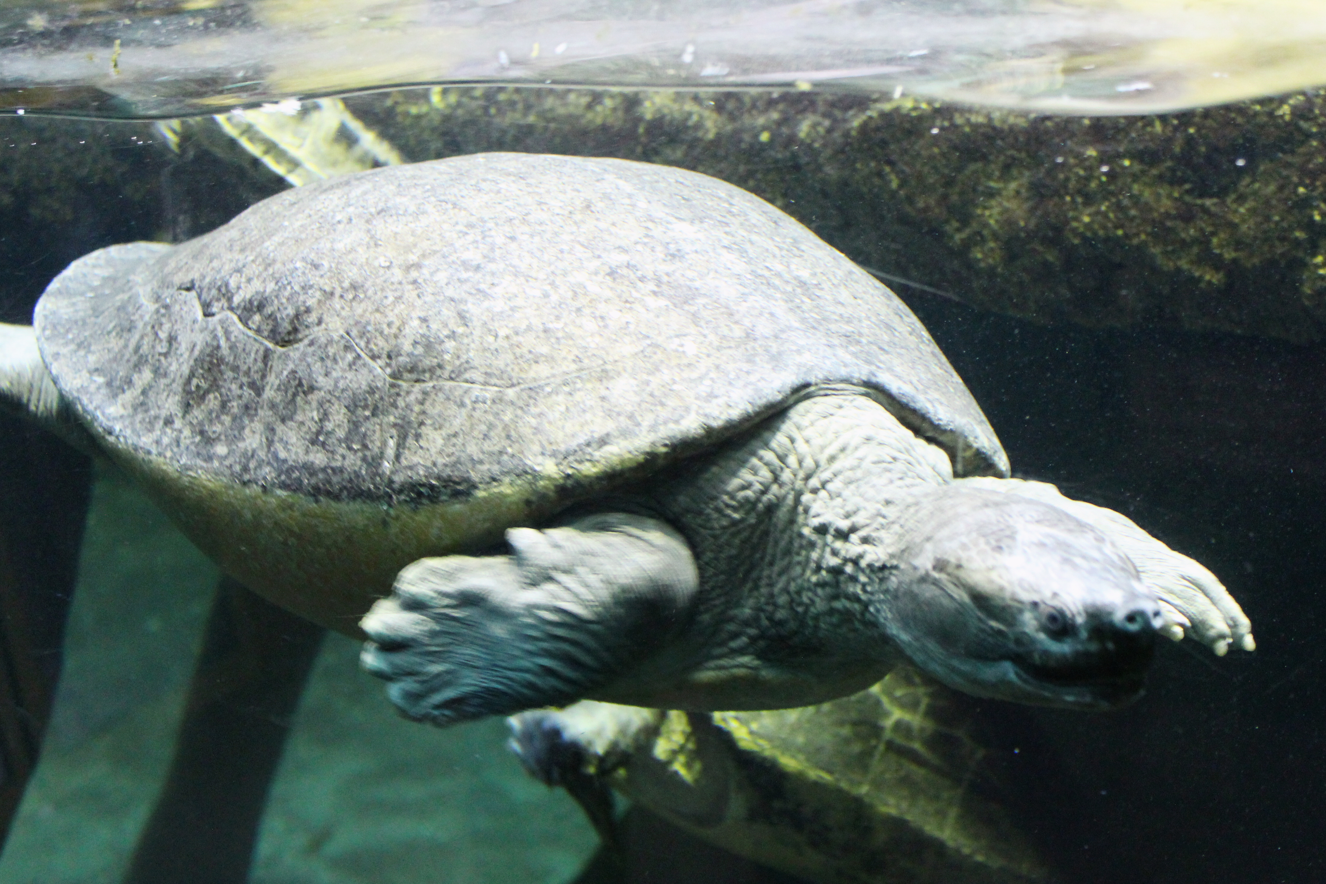 Project: Fotíme Česko